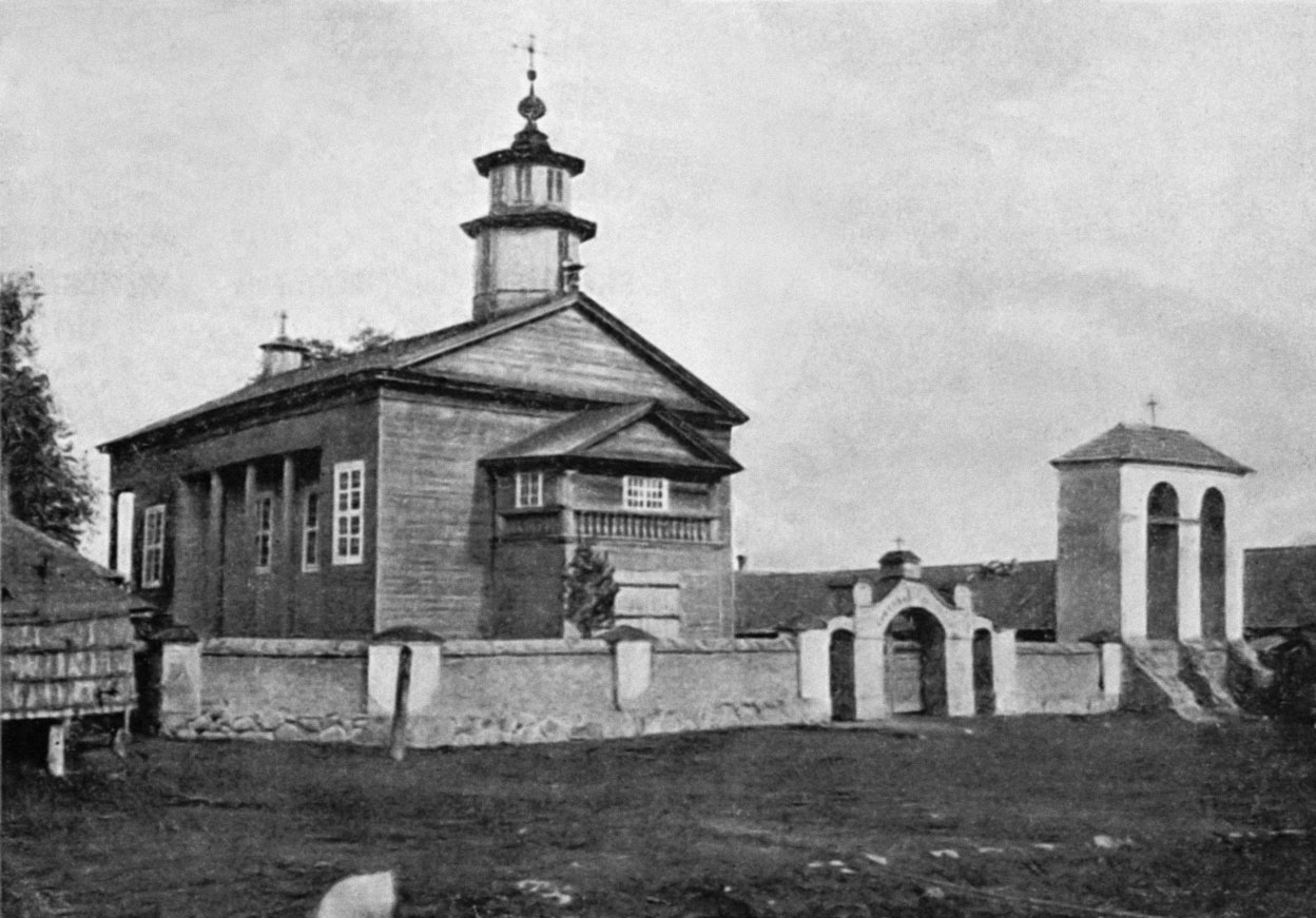 Беларуская (тарашкевіца): Бярэзань (Biarezań), пляц Касьцельны (plac Kaścielny). Касьцёл Маці Божай Шкаплернай